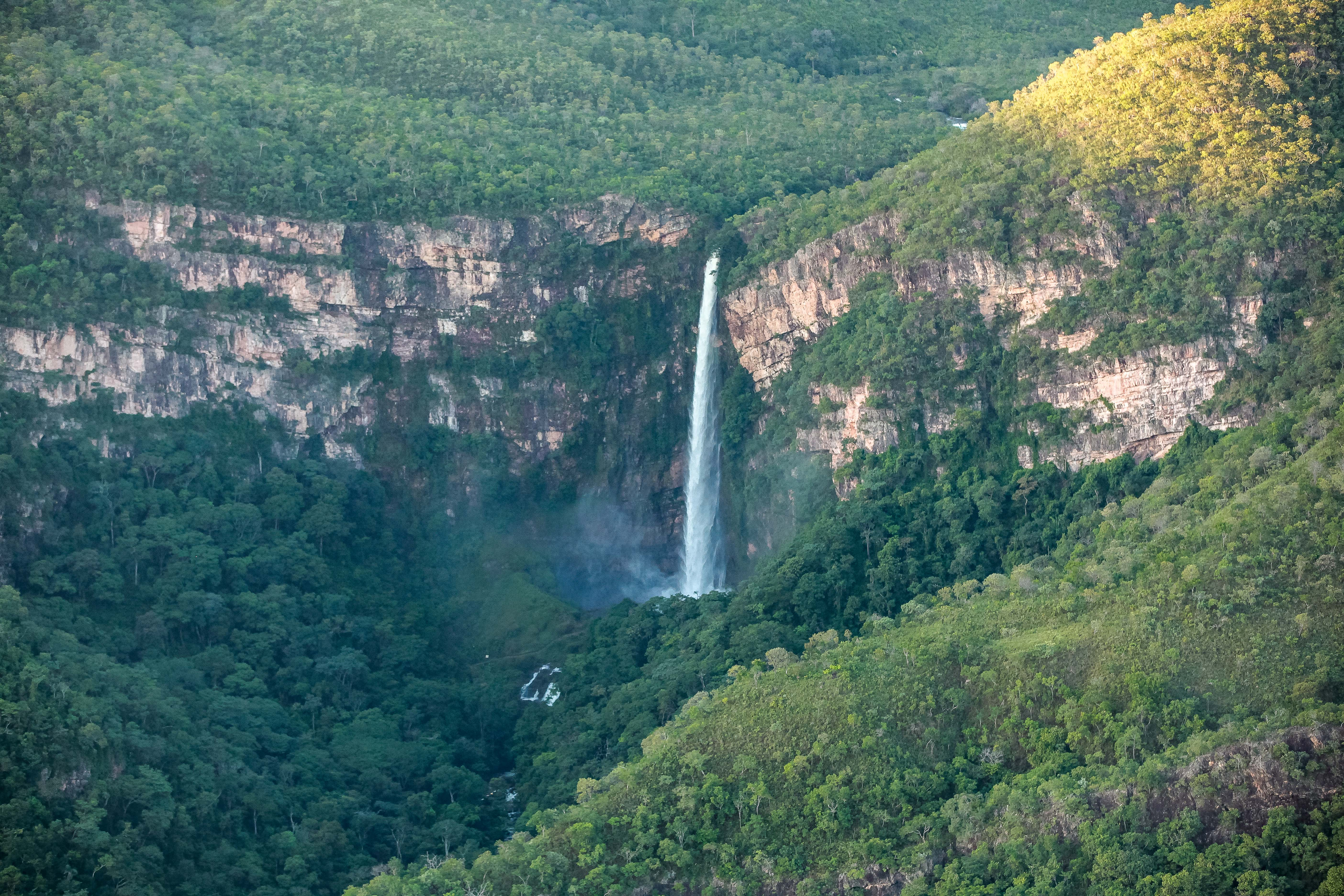 Vista aérea do Salto do Tiquira localizado na cidade de Formosa.